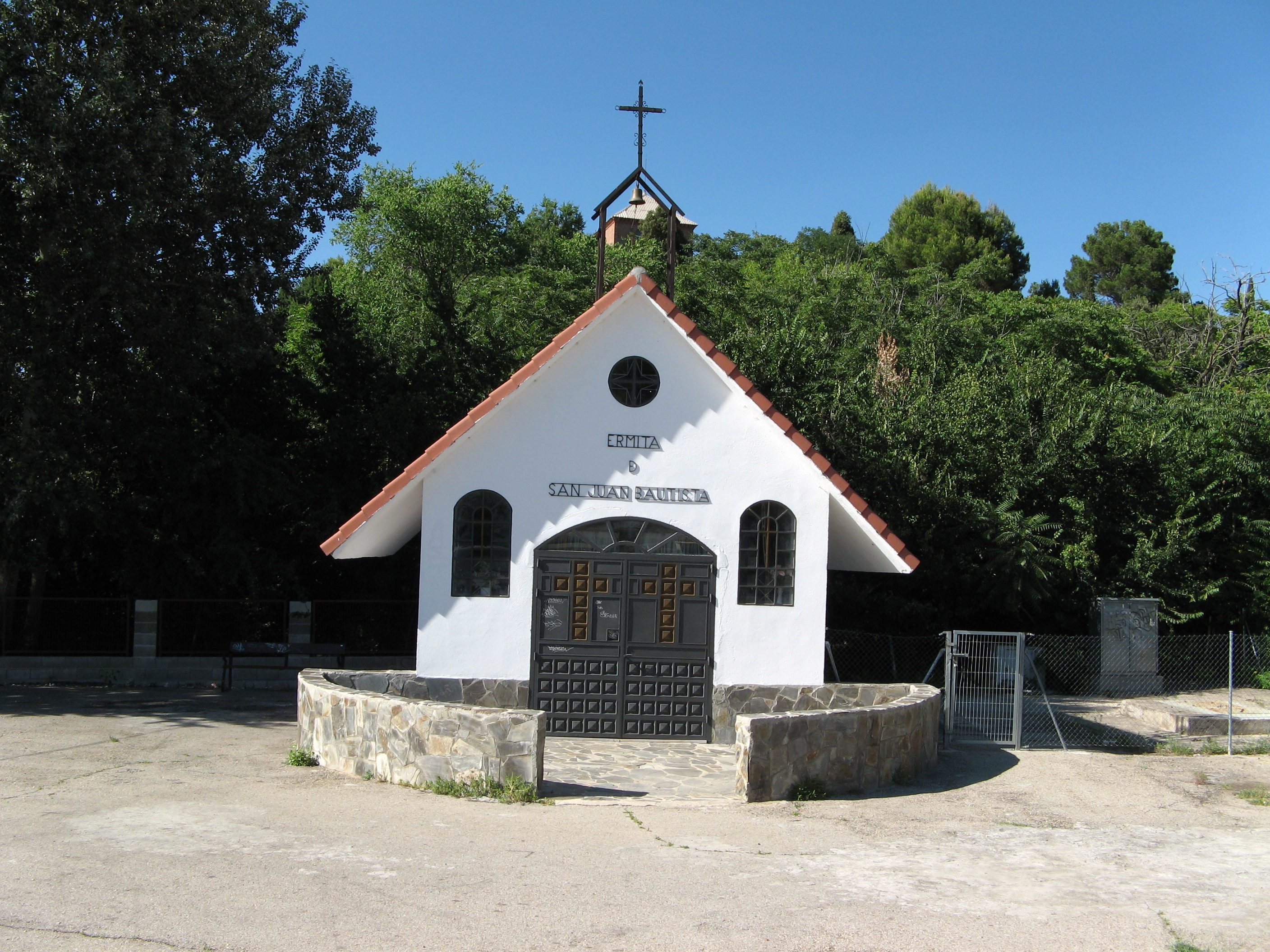 Ermita de San Juan Bautista, Urb. La Cardosa, Valdeavero, Comunidad de Madrid, España.